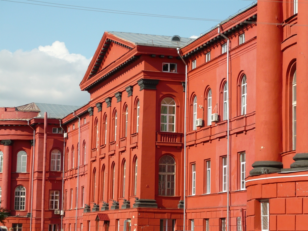 Червоний корпус Київського університету з боку Ботанічного саду: Червоний корпус Київського університету з боку Ботанічного саду